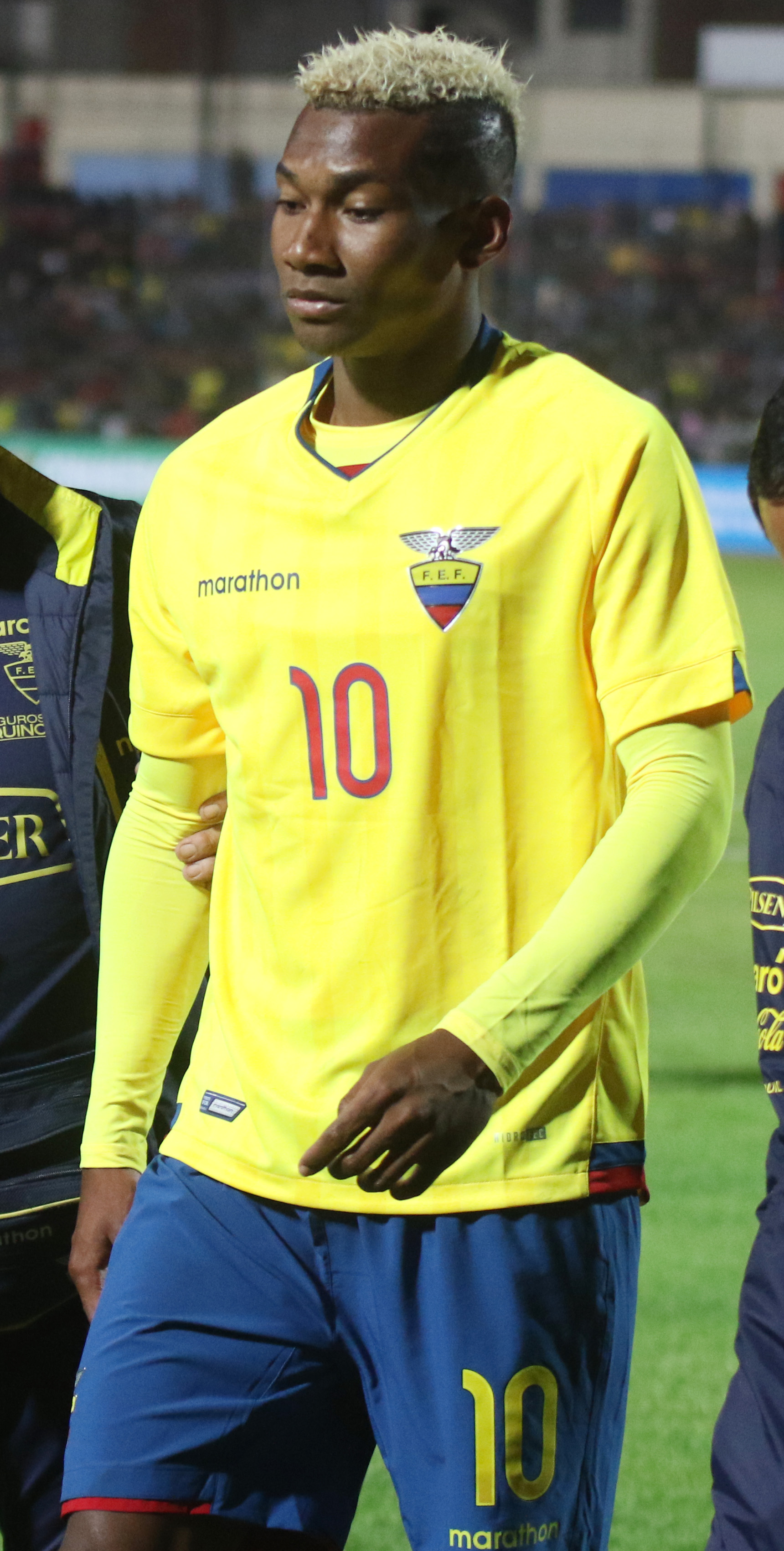 Riobamba, Ecuador, 18 enero 2017 (Andes).- El combinado ecuatoriano dirigido por Javier Rodríguez cayó 1-0 este miércoles ante Brasil en el marco de la primera jornada del Grupo A del Campeonato Sudamericano Sub 20 Ecuador 2017, durante el partido jugado en el estadio Olímpico de Riobamba (centro andino), abarrotado de hinchas. ANDES/Micaela Ayala V.